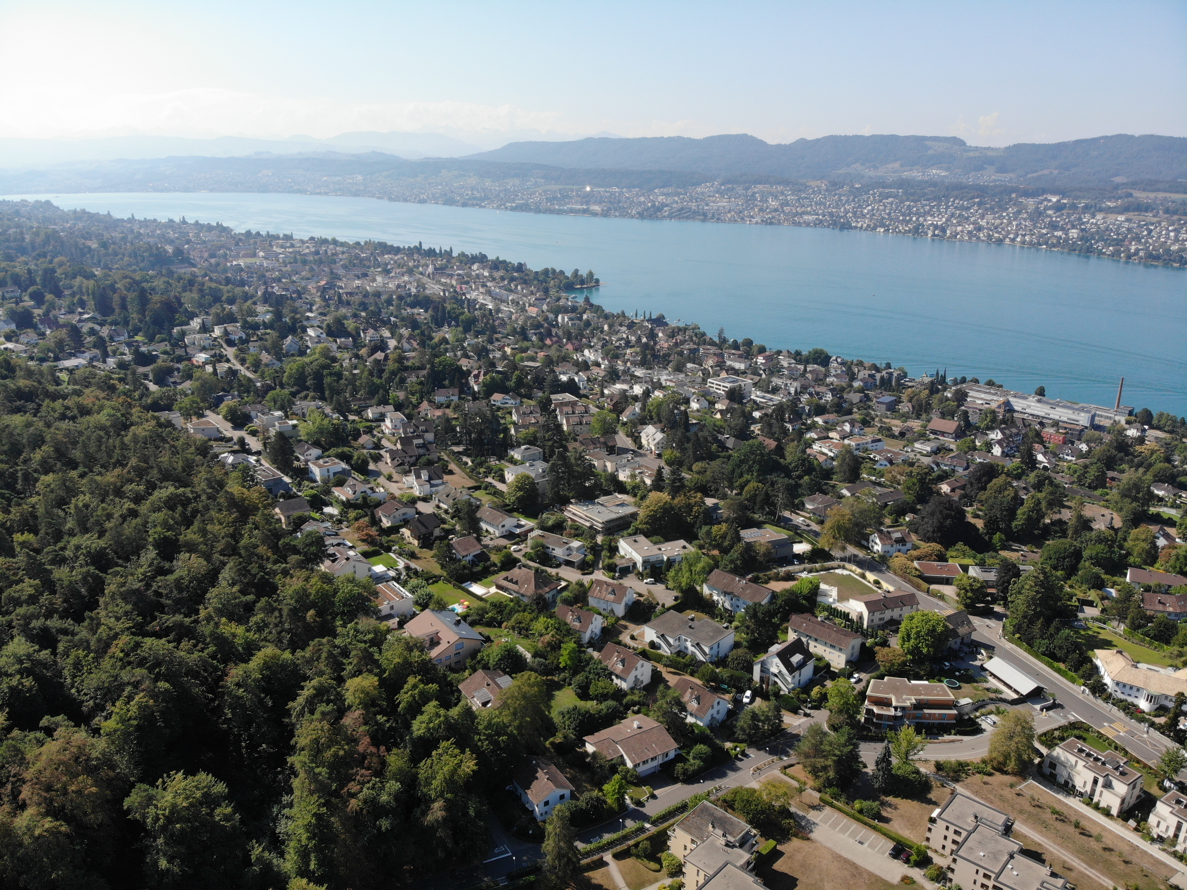 Goldbach ZH